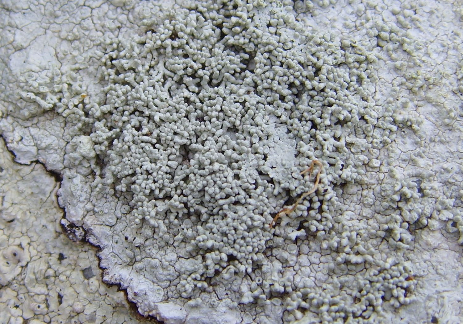 Pertusaria corallina Golvinog - pointe du Raz (Plogoff, Finistère, Bretagne, France)